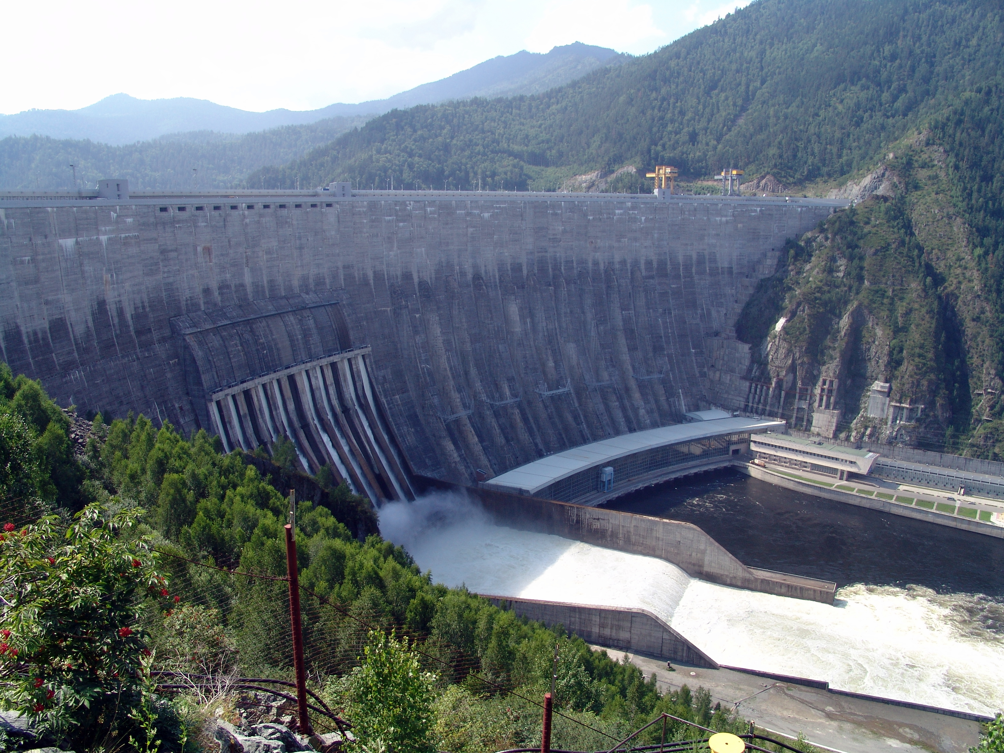 Саяно-Шушенская ГЭС